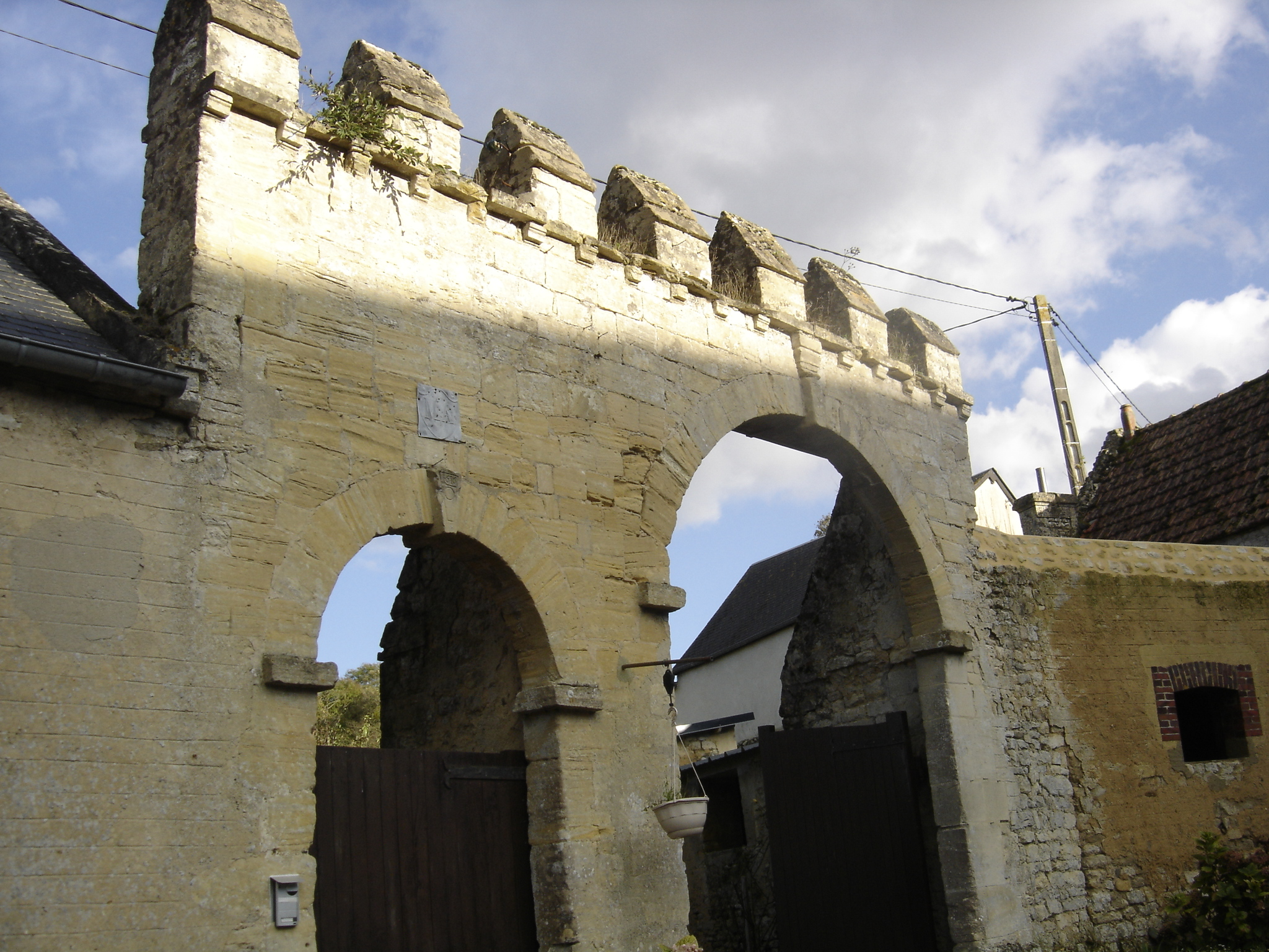 portail de la ferme manoir , dite ferme de l'église à Commes.Les créneaux sont décoratifs.La date de construction : 1616, est gravée dans la pierre